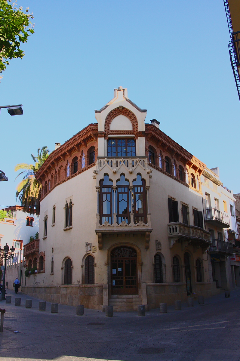 Casa de Domènech i Montaner (Canet de Mar-Maresme-Catalunya), obra de Lluís Domènech i Montaner 1918.